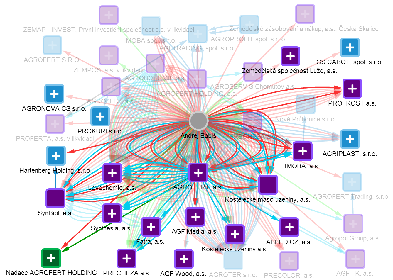 Ing. Andrej Babiš - Grafické zobrazení vztahů osob a firem, konec roku 2013